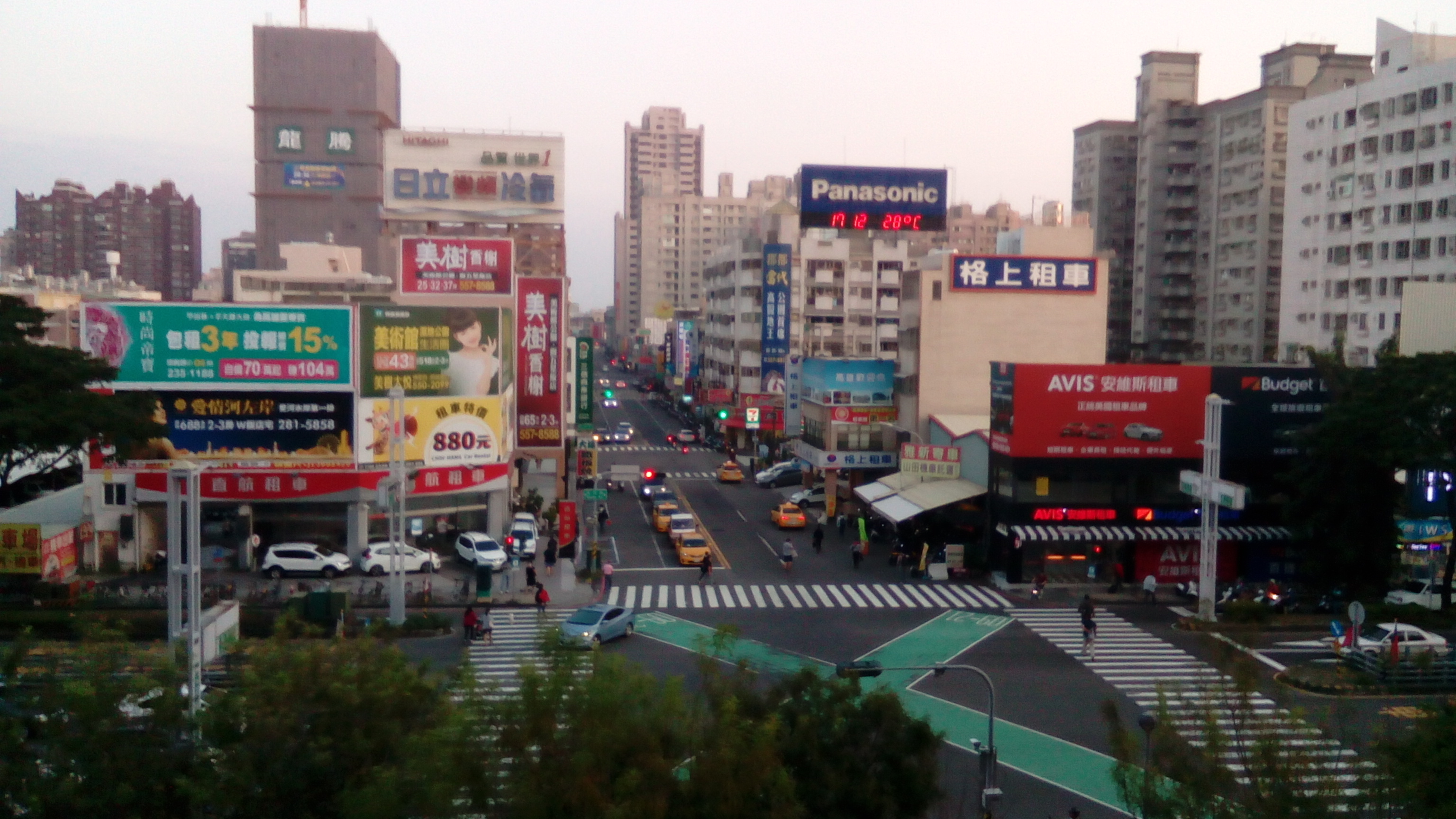 下方為重信路(東西向)和高鐵路(南北向)